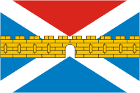 Флаг Крымска, Краснодарский край, Россия.